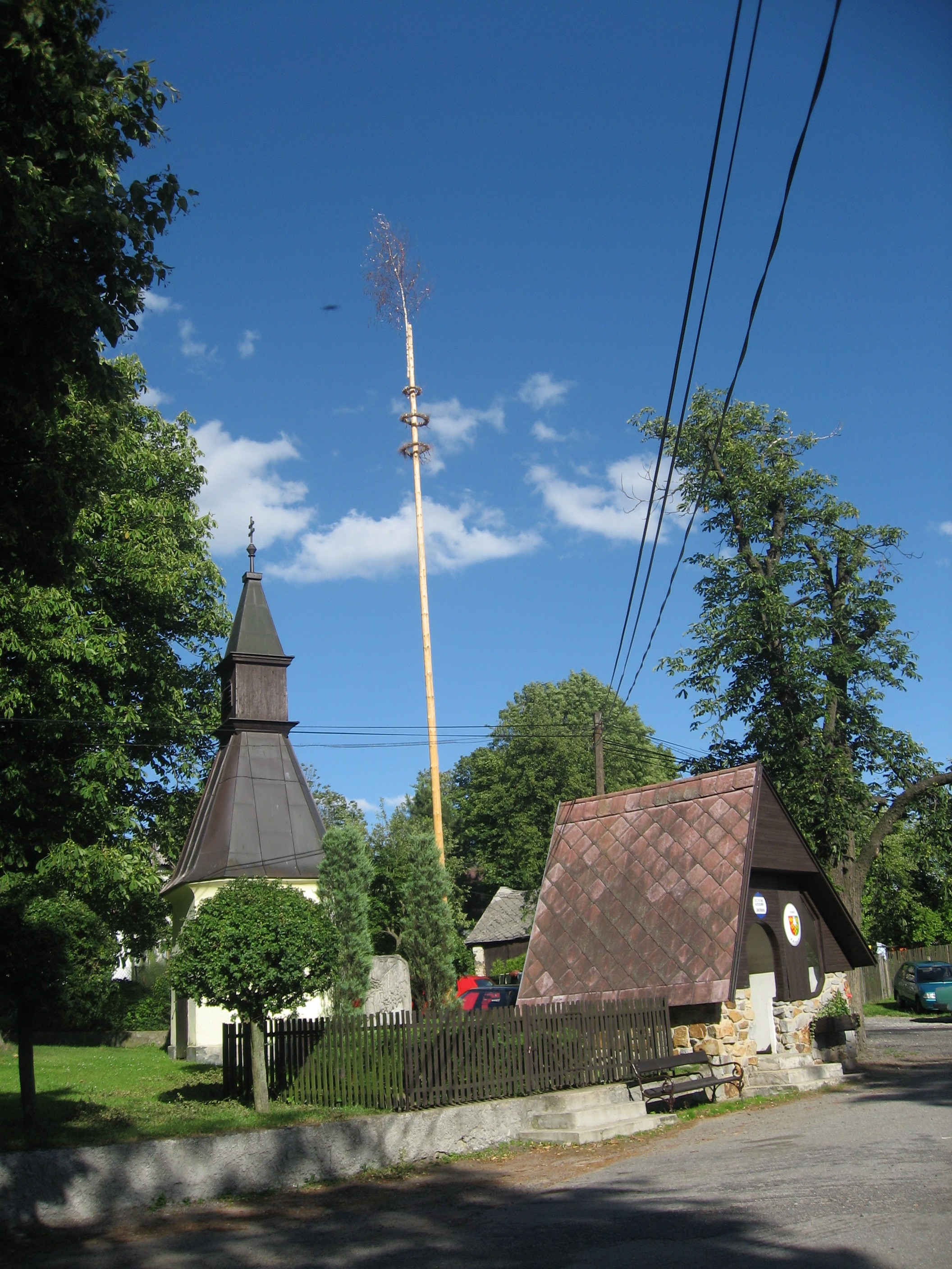 Kalhov, centrum obce